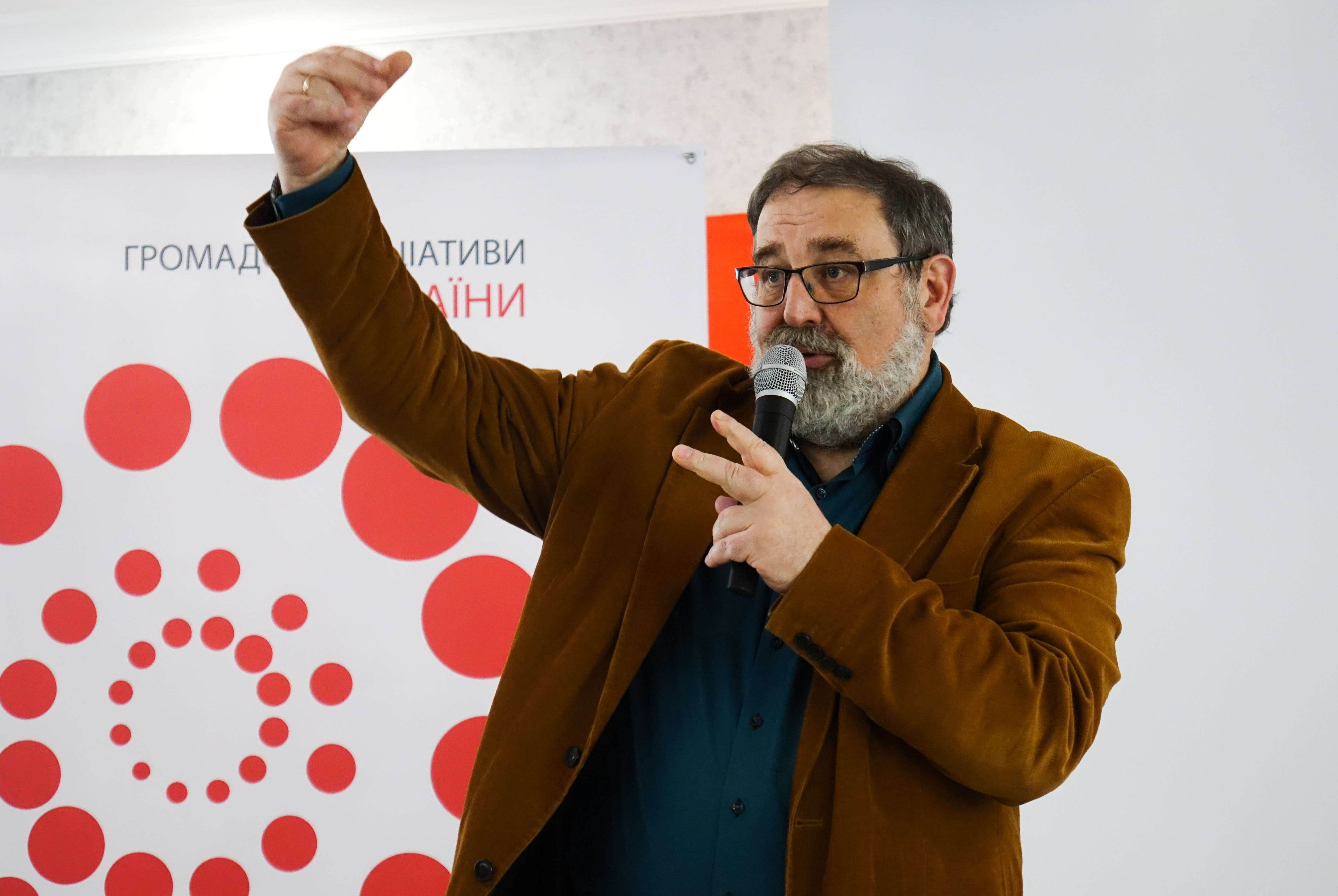 Krzysztof Stanowski z mikrofonem na tle plakatu